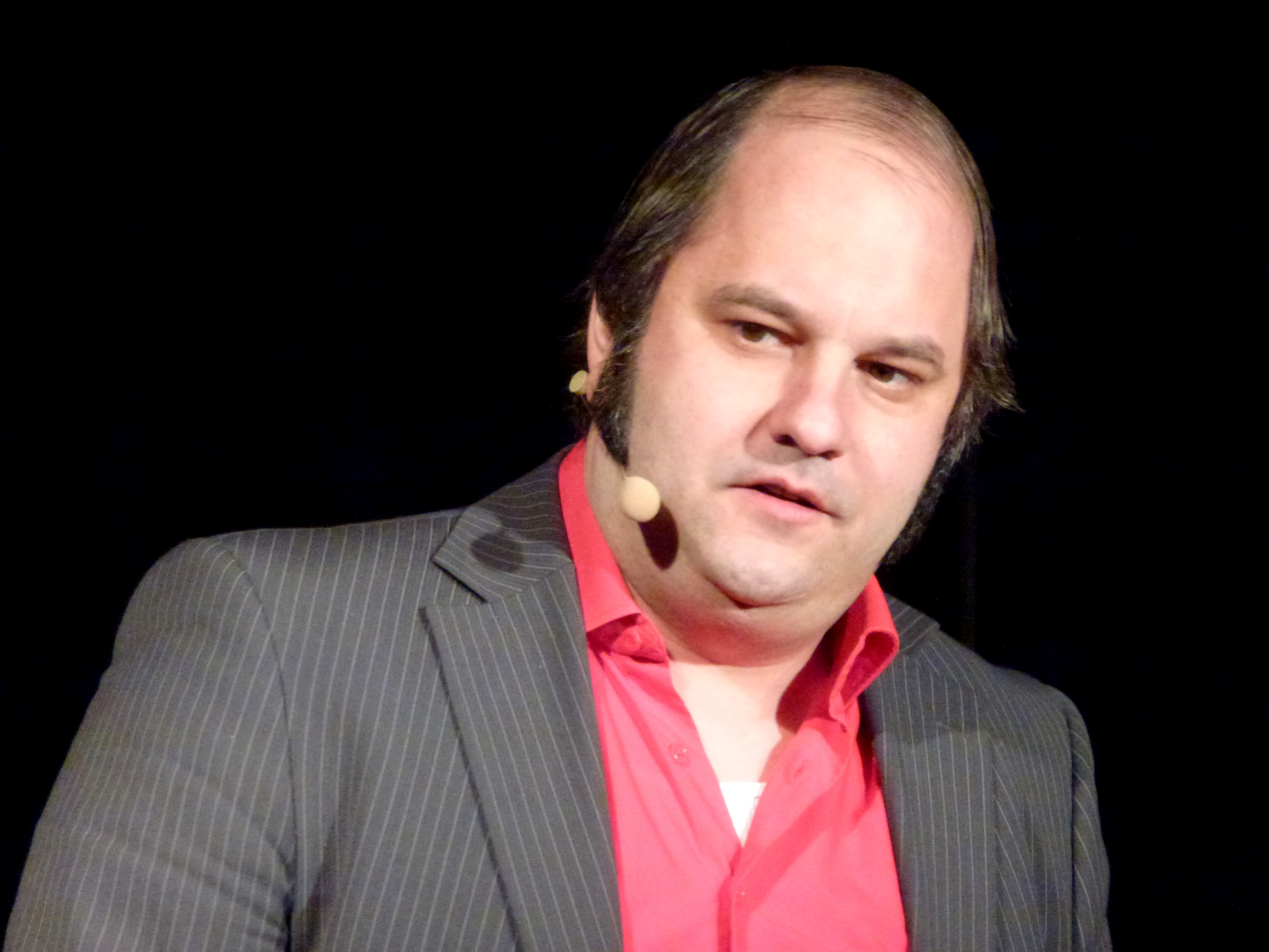 Matthias Egersdörfer in dem Kabarettstück "Ich meins doch nur gut"